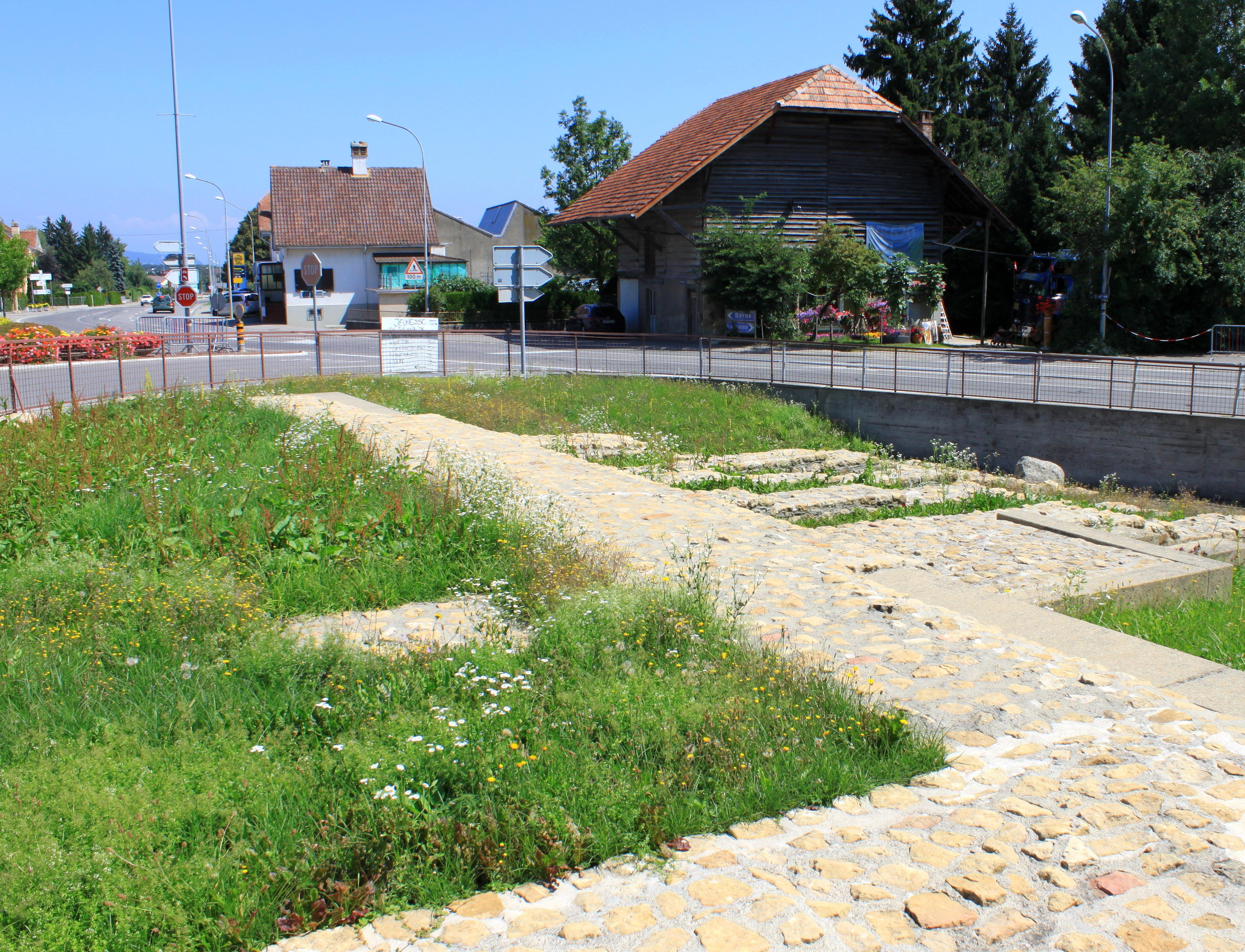 Suisse, canton de Vaud, Avenches, Aventicum (ville romaine). Vue du temple de la Granges-des-Dîmes.